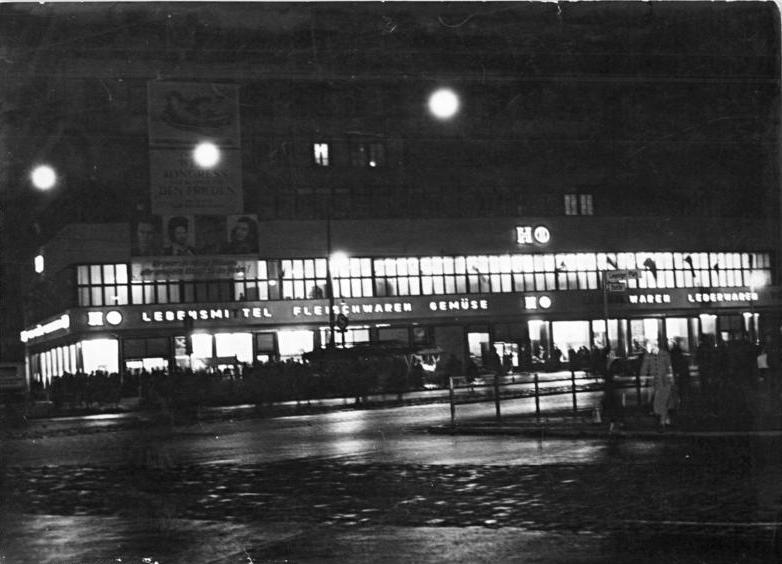 Berlin, Potsdamer Platz, HO-Kaufhaus, Nacht Illus Richter 25.1.51 Berlin bei Nacht. UBz: Das HO-Kaufhaus im Columbushaus am Potsdamer Platz. Information added by Wikimedia users.